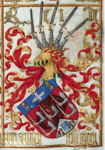 painted by Antonio Godinho in the Livro da Nobreza e da perfeicao das armas (c. 1528-1541)